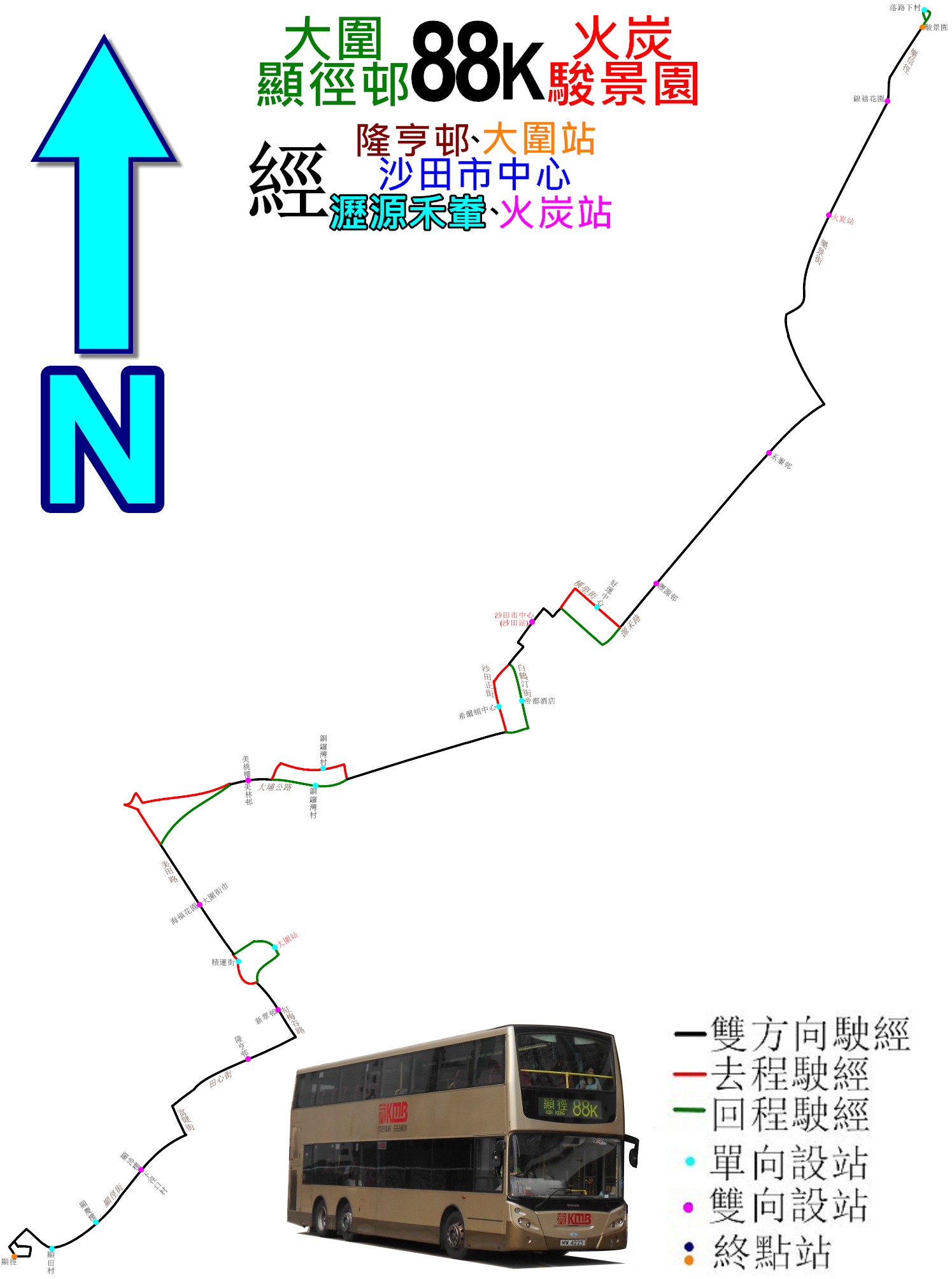 中文（香港）: 九巴88K線的走線圖